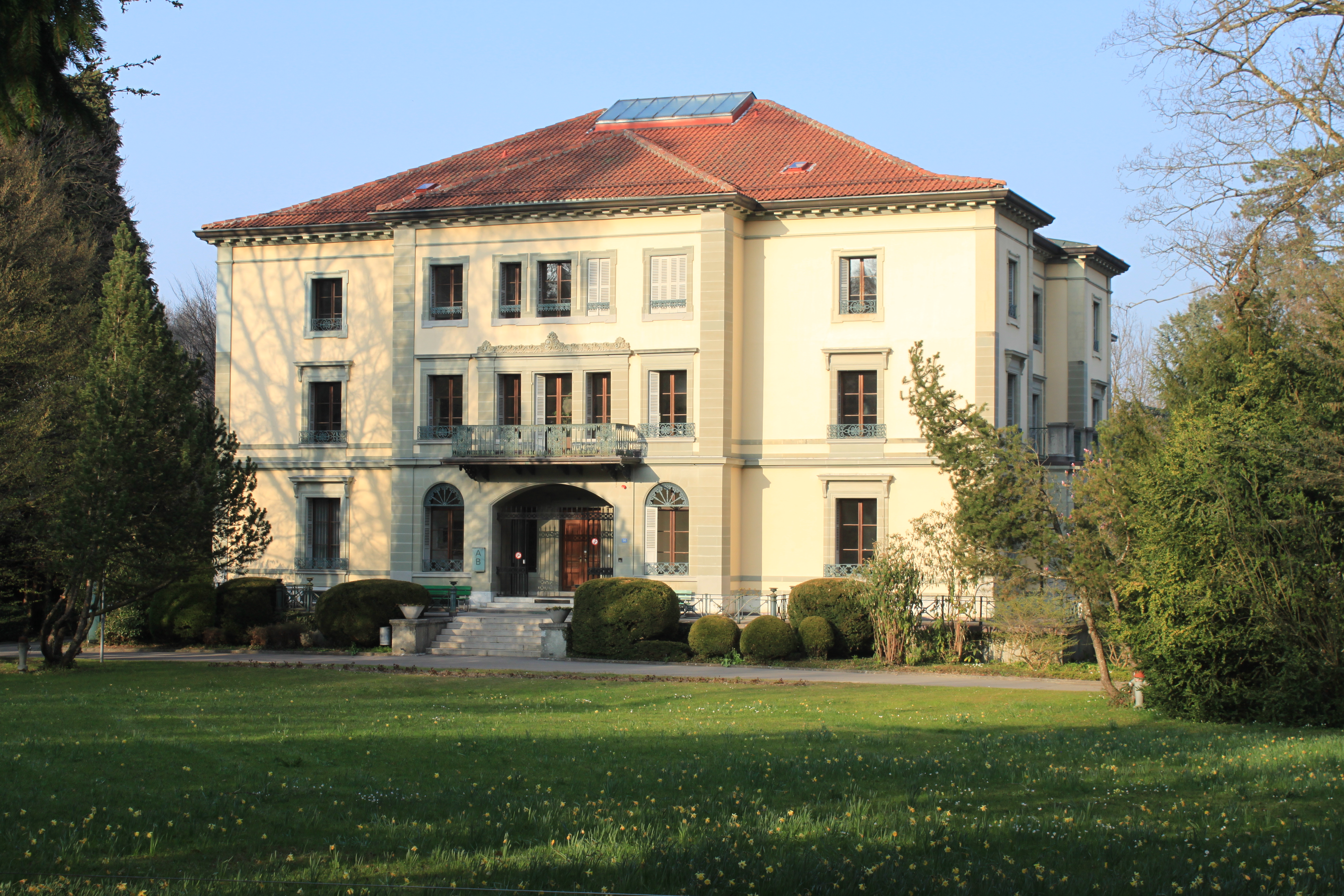 Verwaltungs- und Bürogebäude der PH Freiburg/HEP Fribourg, sogenannte Villa, Eingangsfassade